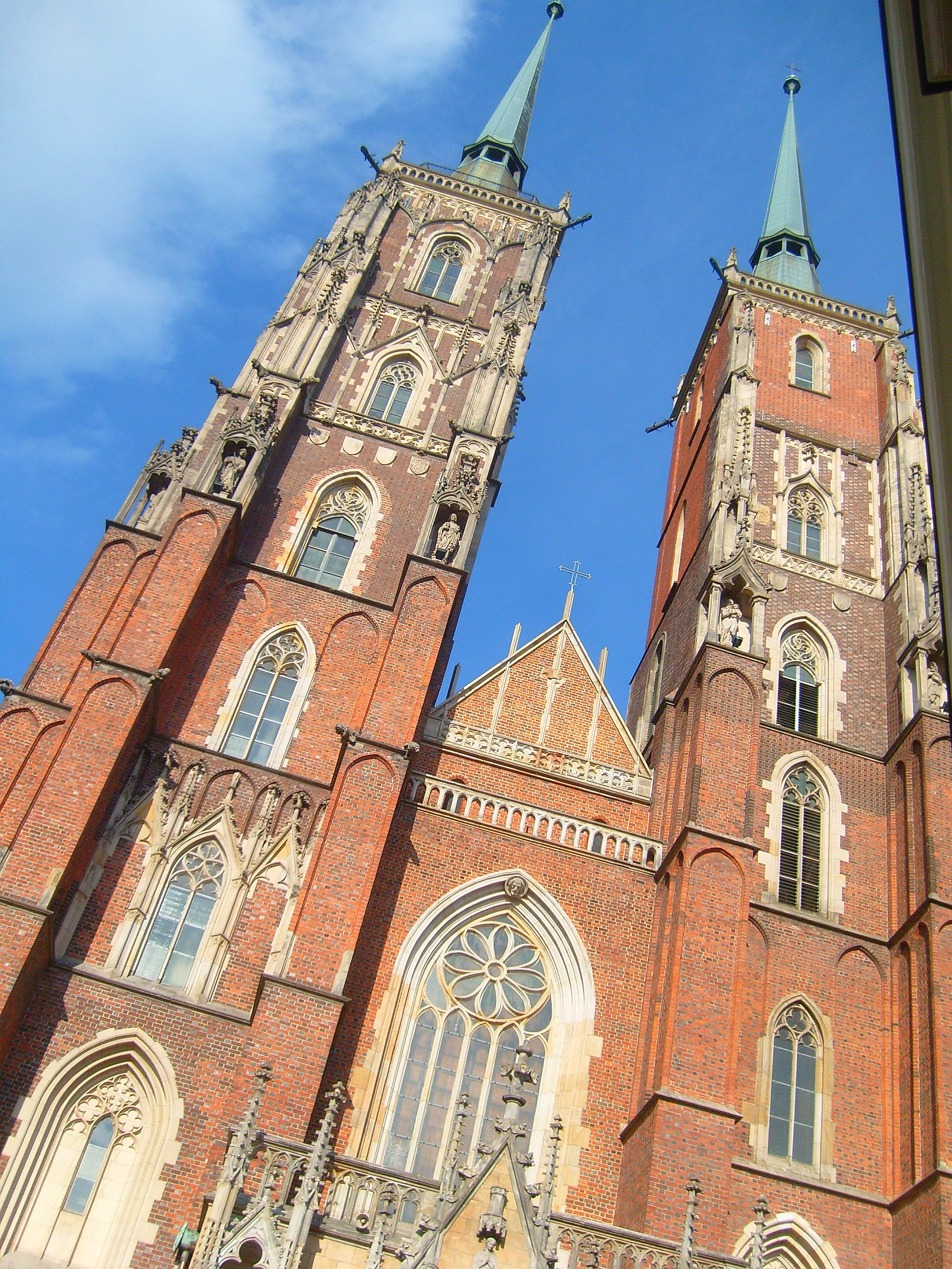 Wrocław